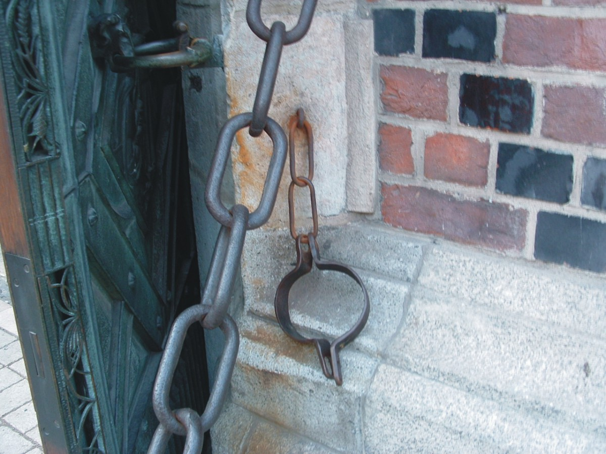 Obręcz dla pokutników przy bocznym wejściu do kościoła mariackiego w Krakowie